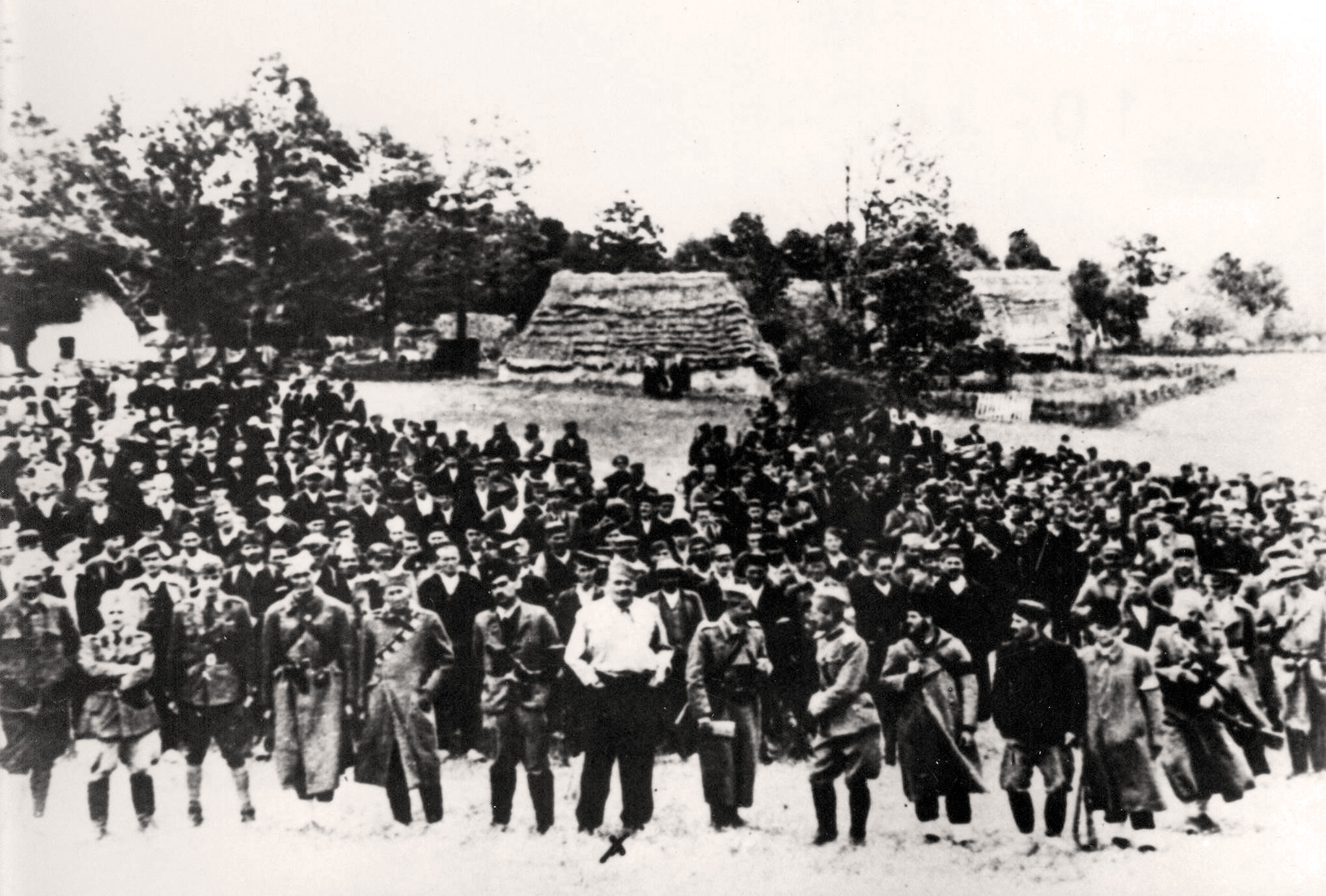 Srpskohrvatski / српскохрватски: Četnički komandant Dobrosav Jevđević (u beloj bluzi) sa Italijanima i četnicima Baje Stanišića u pripremi za operaciju Vajs, na putu za Mostar 1943.